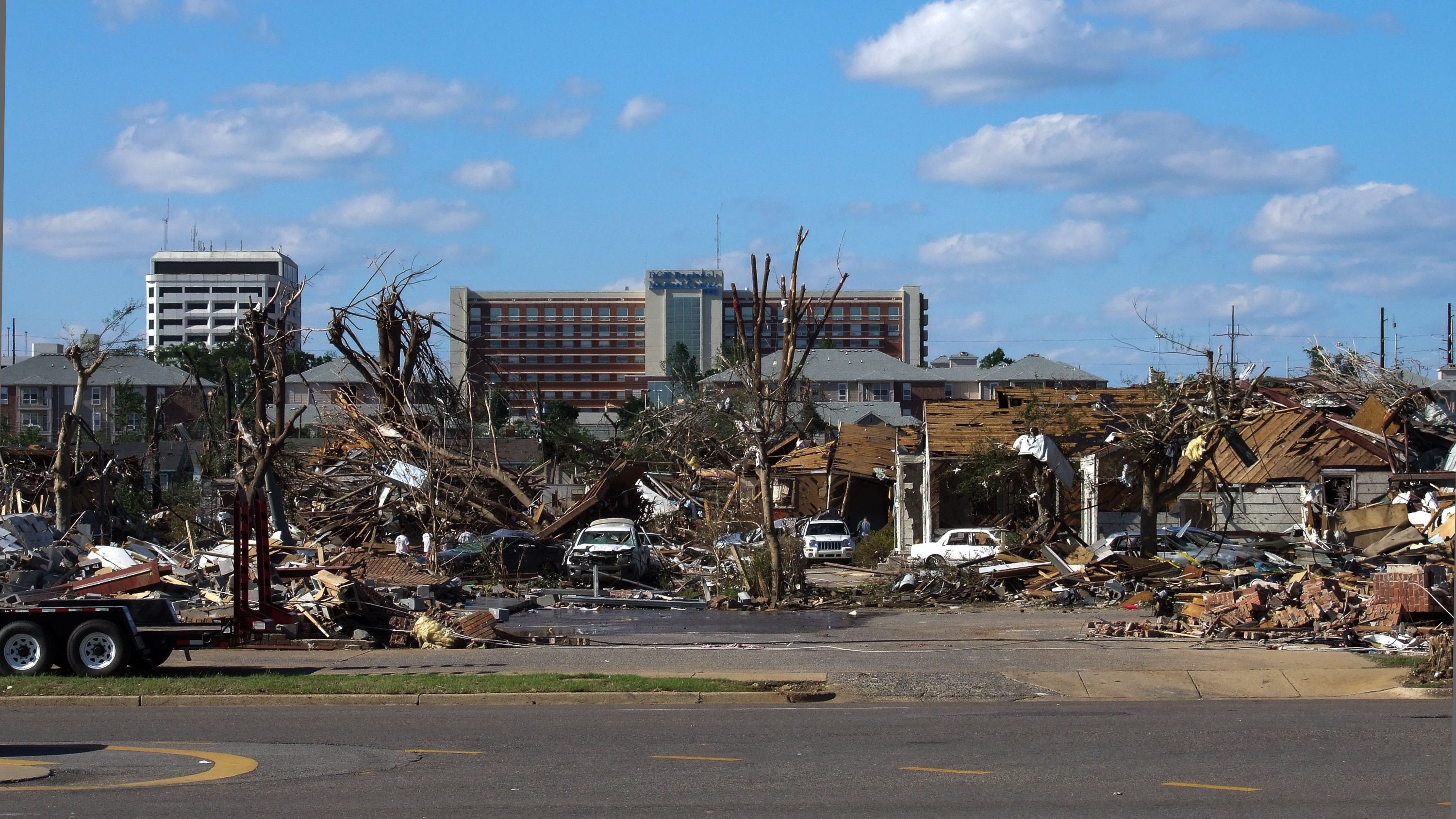 Aufnahme entstand am Tag nach dem F4-Tornado an der 15th Street, Ecke McFarland Boulevard in Tuscaloosa, Alabama, USA. Blickrichtung Süd nach Nord.